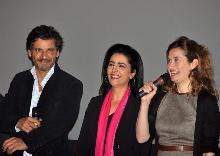 Pascal Elbé, Areen Omari et Emmanuelle Devos, à une avant-première du film Le Fils de l'autre .